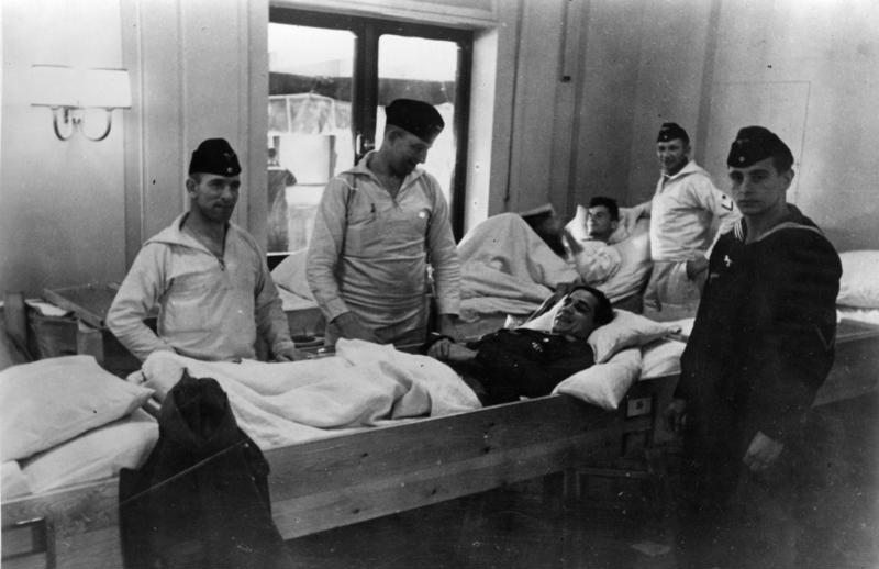 Lazarettschiff "Wilhelm Gustloff" Scherl Bilderdienst Aktion in Norwegen: Lazarettschiff "Wilhelm Gustloff" bringt verwundete Narvikkämpfer nach der Heimat. Freudig lachend Sieht dieser verwundeten Narvikkämpfer, dessen Brust das EK I und EK II schmücken, seiner baldigen Genesung in der Heimat entgegen. PK: Augst; Juli 1940